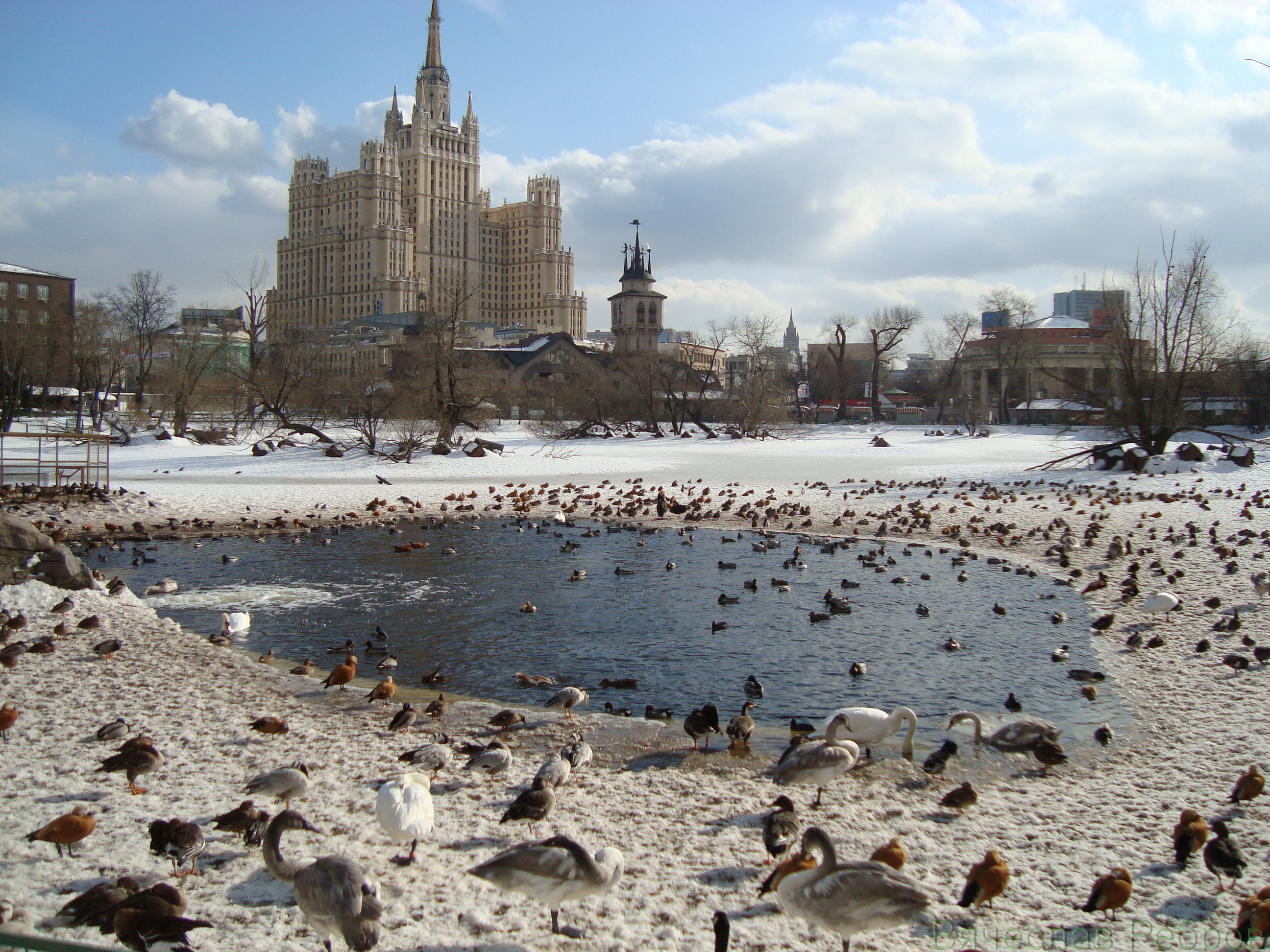 Moscow Zoo